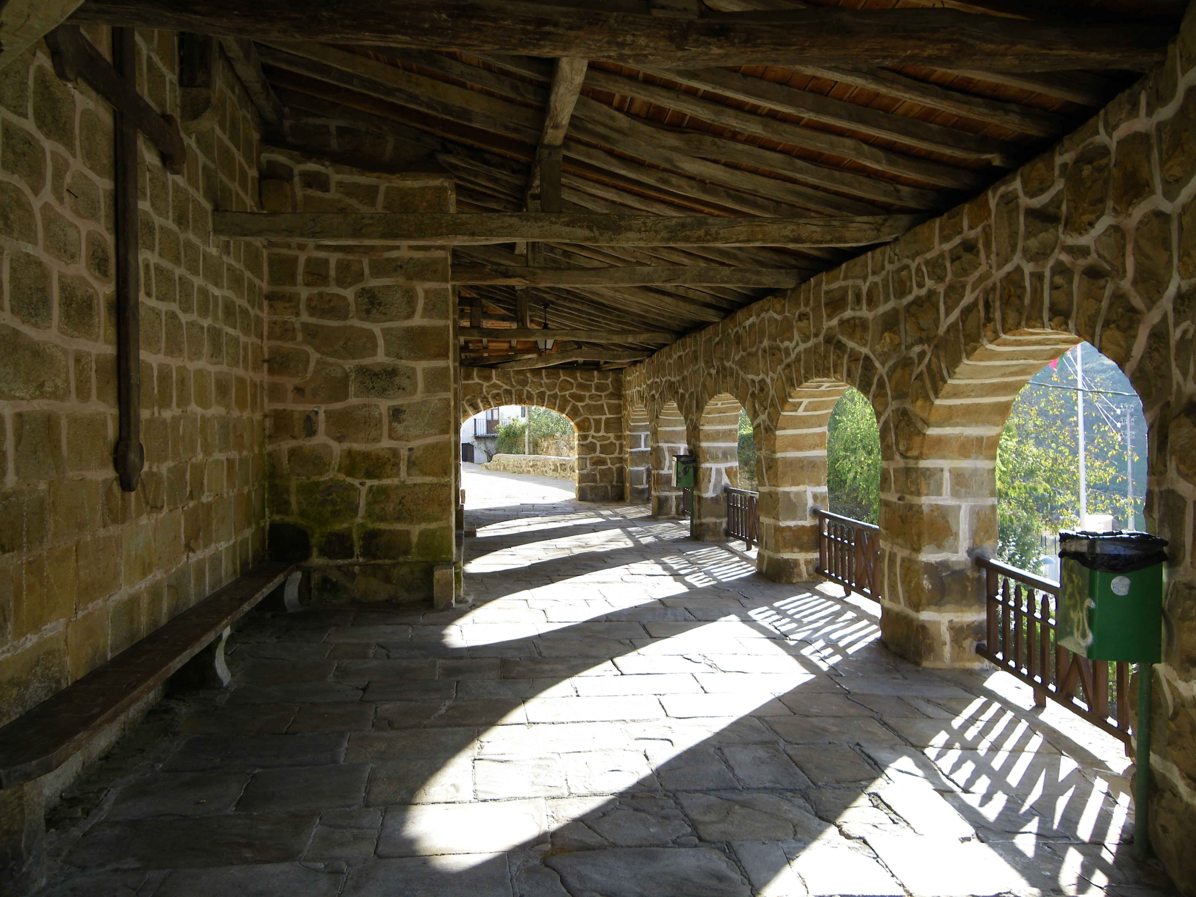 Ibarrangeluko eliza, Bizkaia.